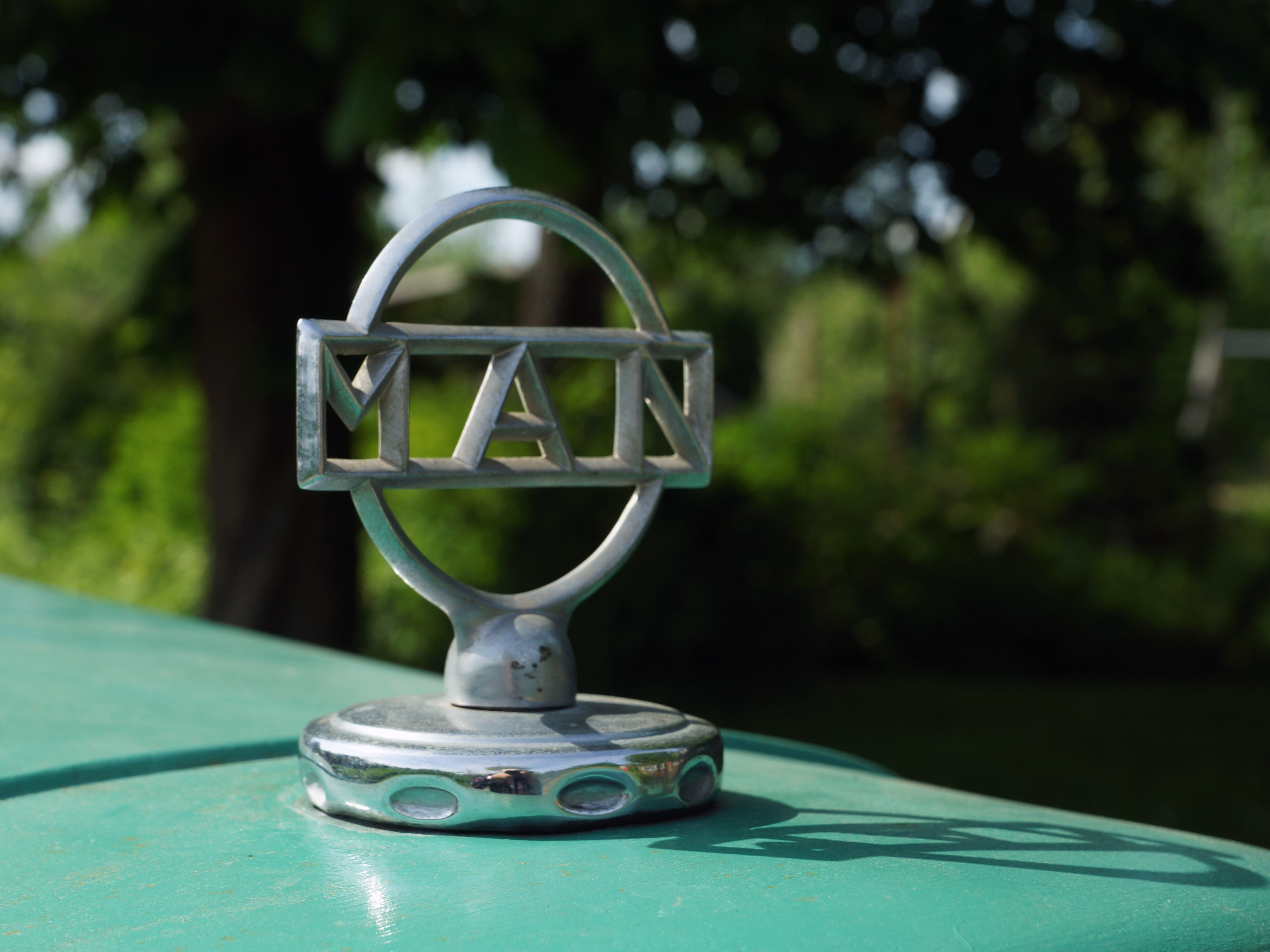 Das MAN-Emblem auf der Motorhaube eines MAN Ackerdiesel Traktors voom Typ A 25 A (Baujahr 1956) - 2013 Foto Wolfgang Pehlemann Steinberg Ostsee DSC03678